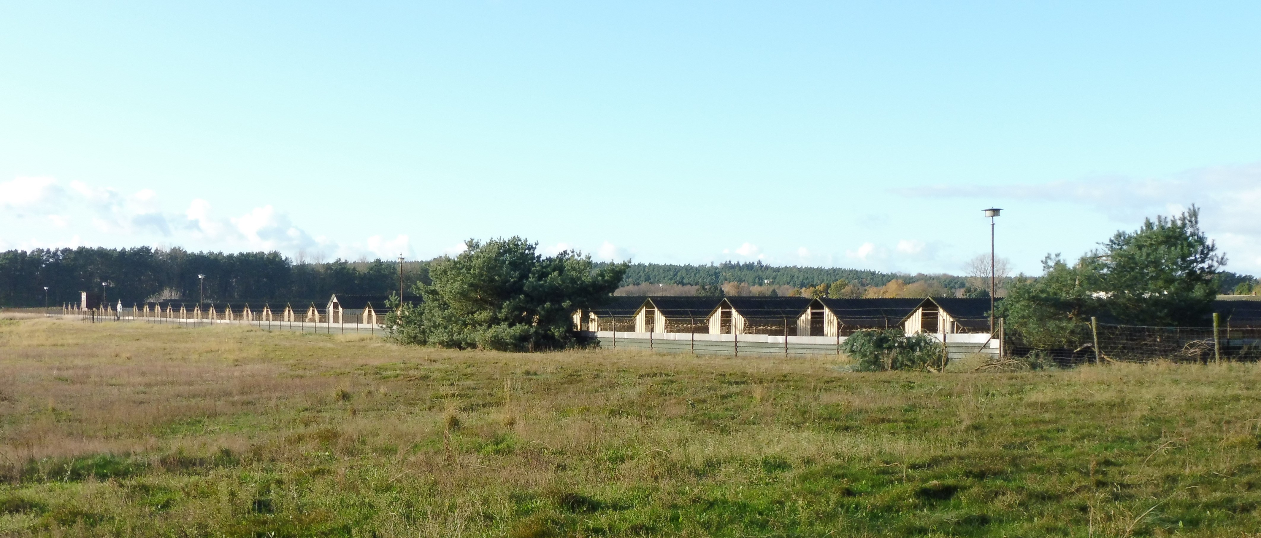 Stillgelegte Nerzställe in Klueß vor Güstrow